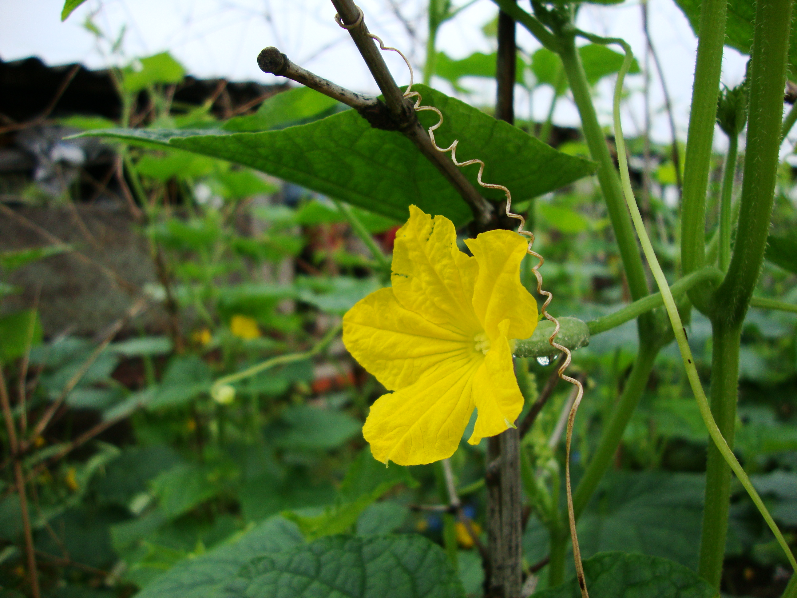 Cucumis sativus L., 1753